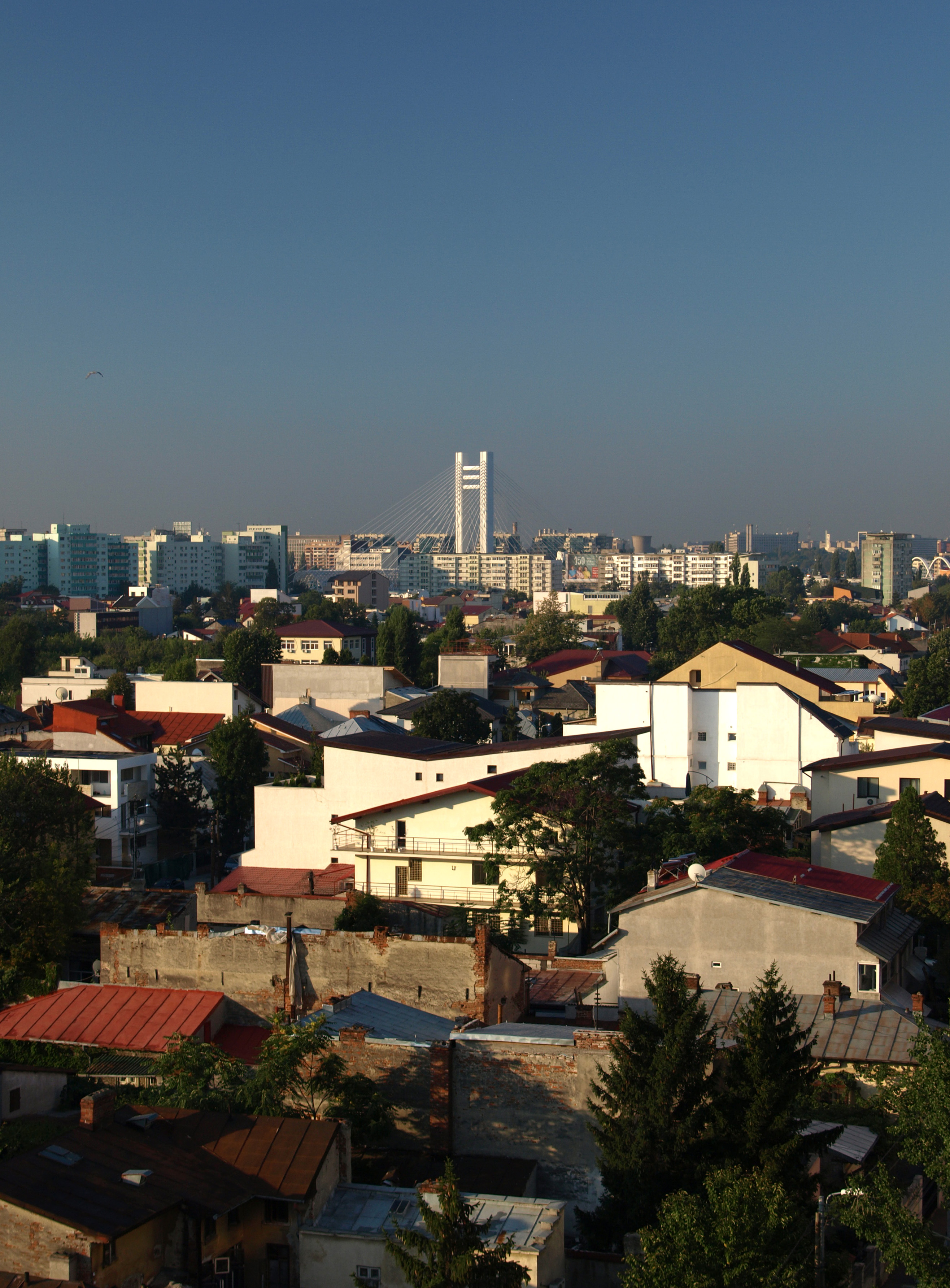 Pasajul Basarab